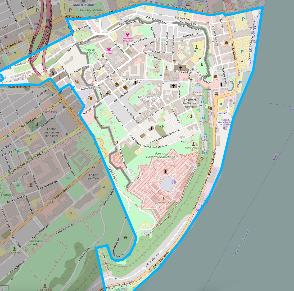 Carte de l'Arrondissement historique du Vieux-Québec, Unesco.